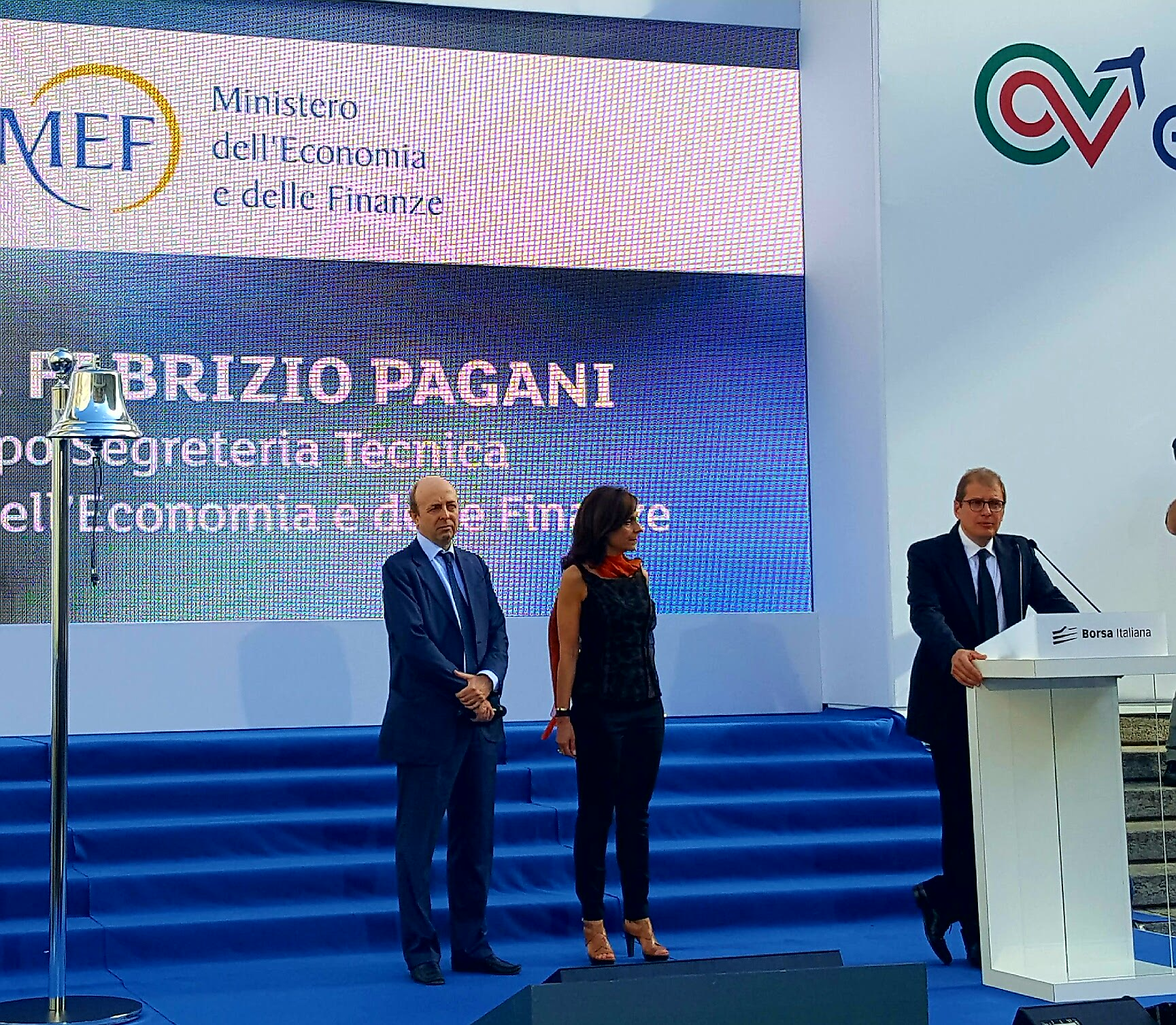 Fabrizio Pagani alla prima quotazione di ENAV alla Borsa di Milano, il 26 luglio 2016